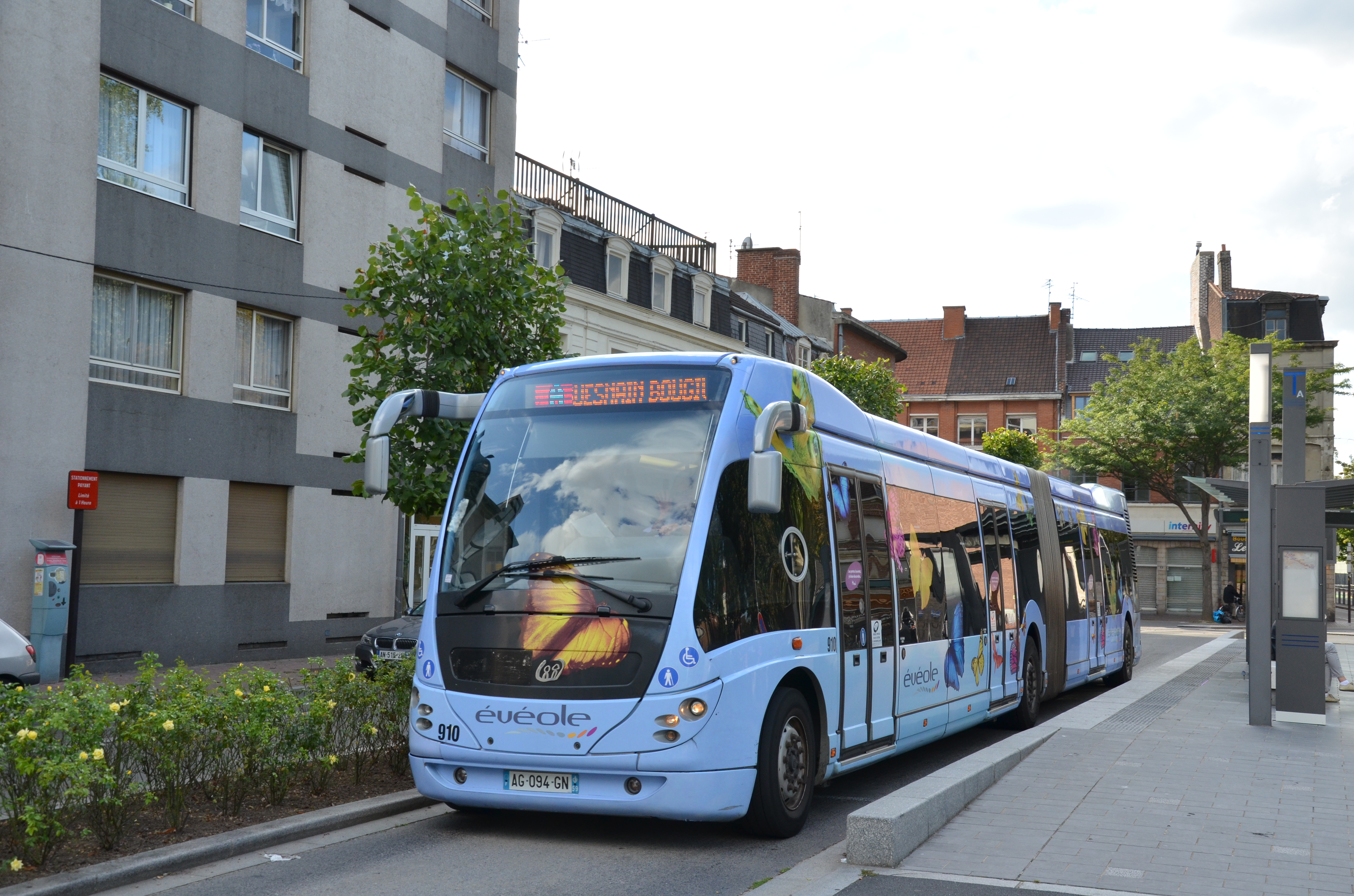 Autobus articulé Phileas 910 à l'arrêt "Place Carnot", sur le réseau Evéole de Douai.